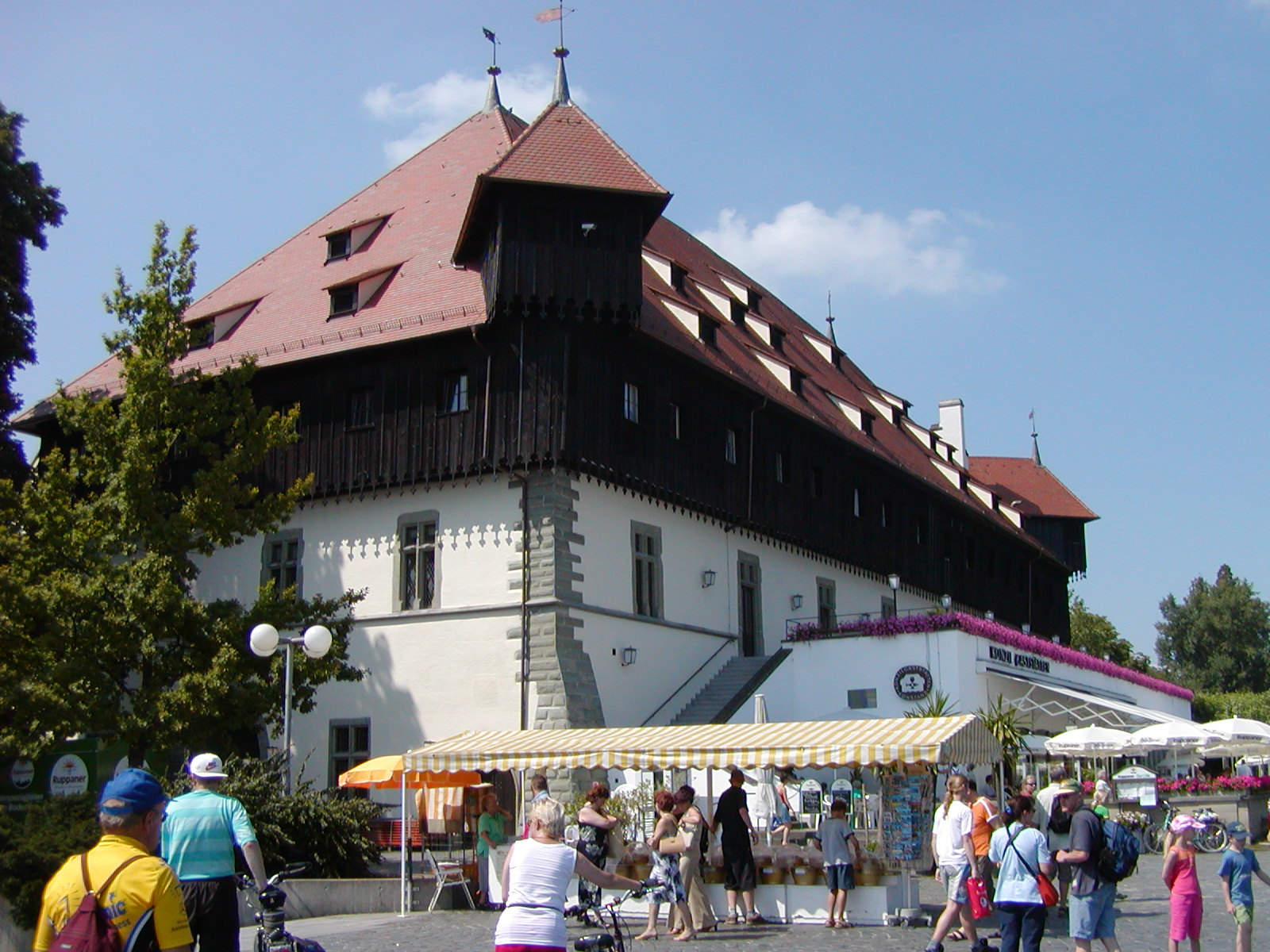 Bildbeschreibung: Konzilgebäude Konstanz Fotograf-- Ingo2802 22:27, 12. Apr 2006 (CEST) Datum: 05.08.2004 Sonstiges: ...